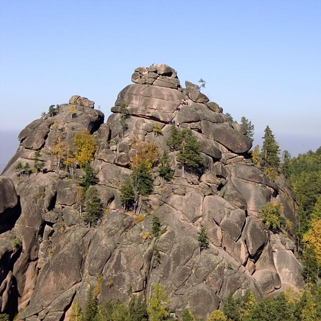 Скалы на территории Красноярский заповедник "Столбы". Вид со Второго столба на Первый столб (приближено).